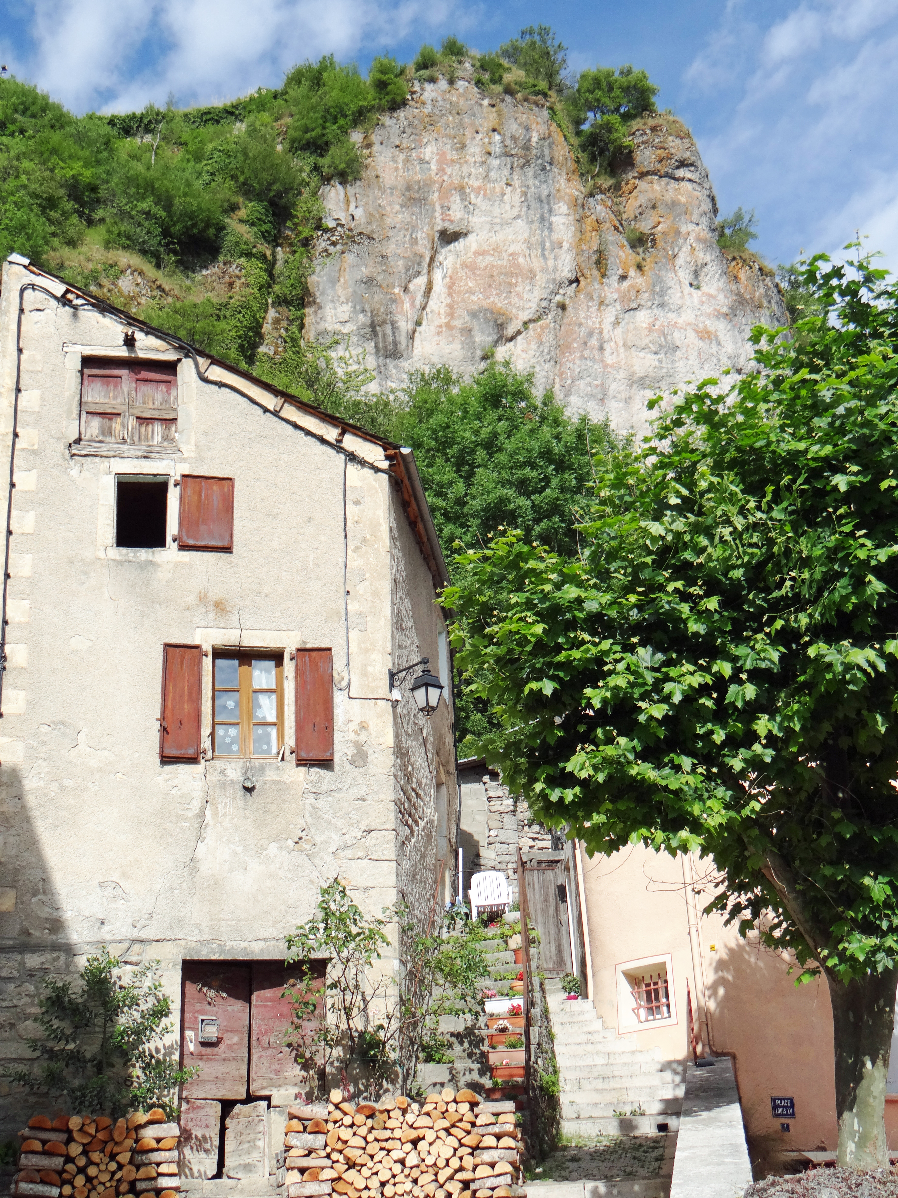 Meyrueis - Sous le rocher du château, près de la placette